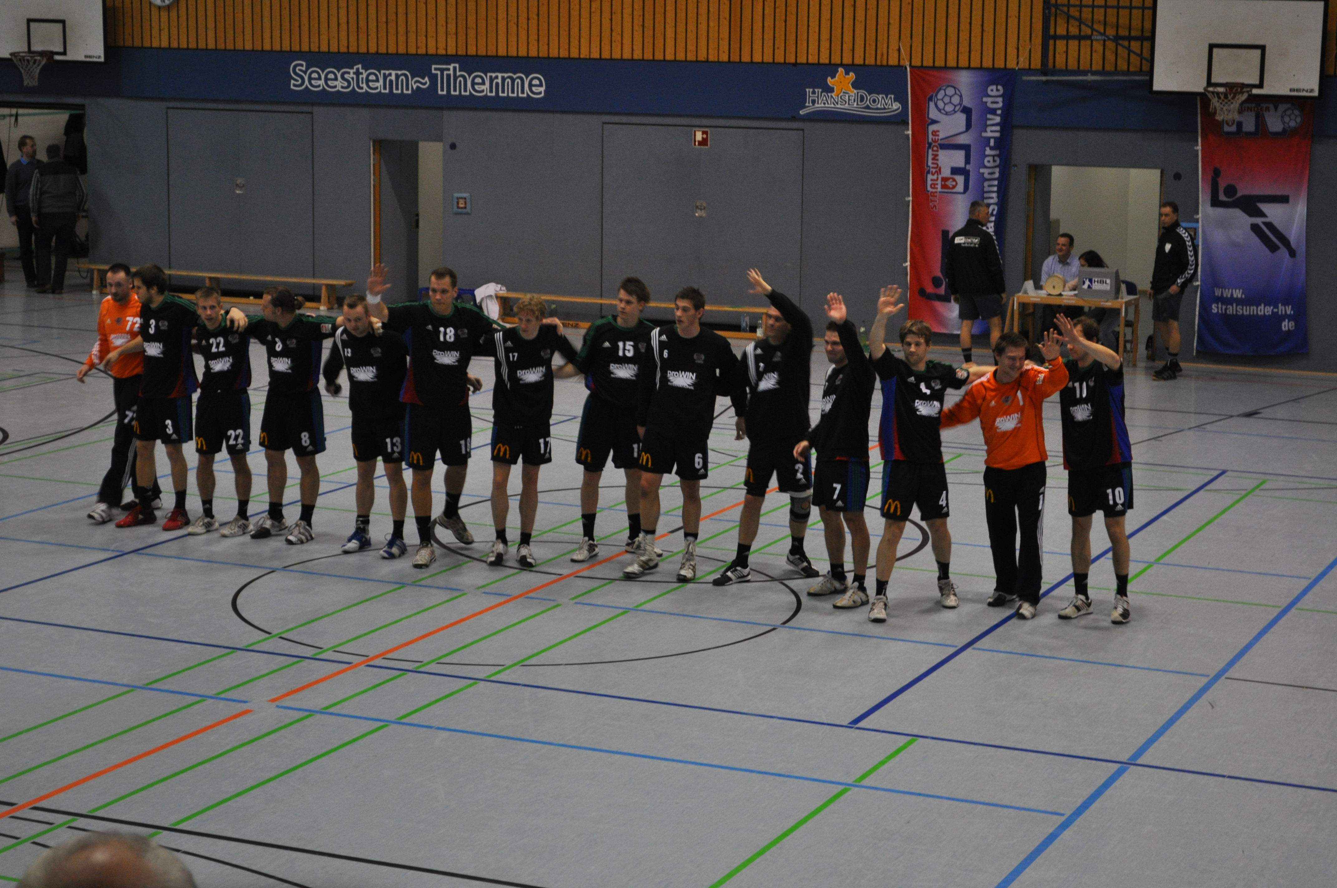 Die erste Herren-Handballmannschaft des SV Henstedt-Ulzburg am 13. November 2010 vor dem Ligaspiel der 3. Liga beim Stralsunder HV in der Vogelsanghalle Stralsund.